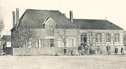 Mairie de Les Bordes-Aumont. Début du XXe s.